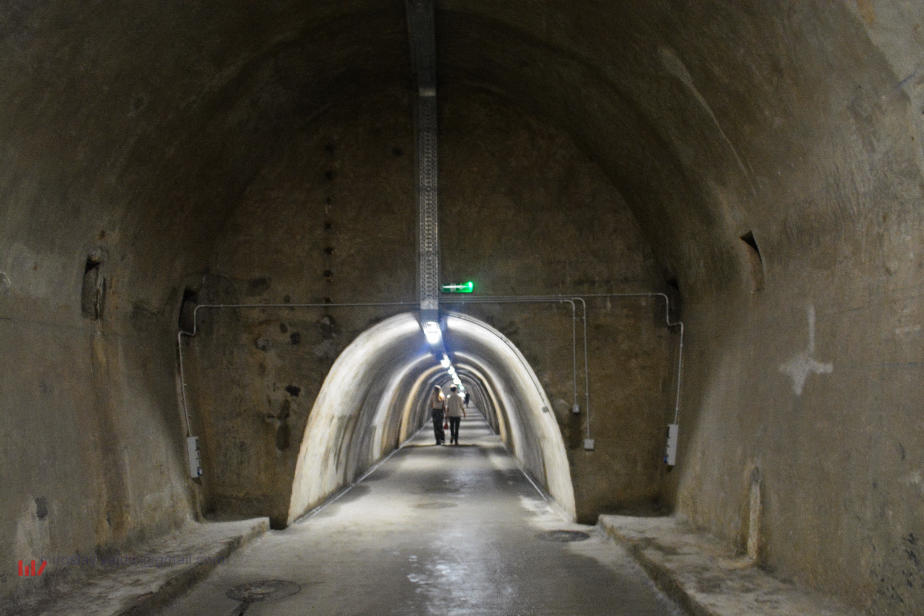 Underground tunnels beneath Zagreb